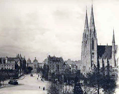 Eglise Saint-Paul de Strasbourg en 1900